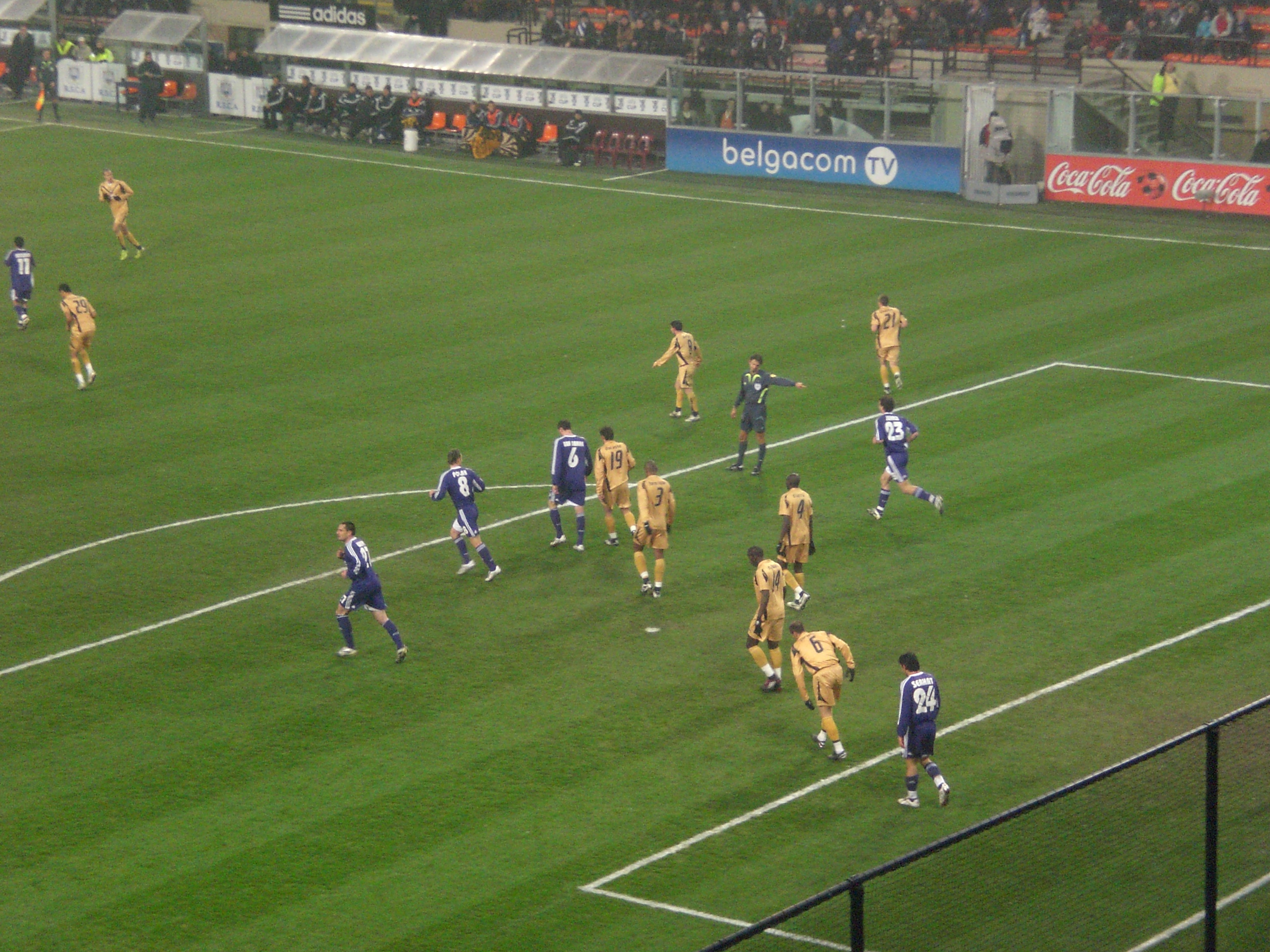 Action arreté par l'arbitre lors du match de 1/16ème de finale de de coupe UEFA, entre le RSC Anderlecht et les Girondins de Bordeaux (2-1), le 13/02/08.